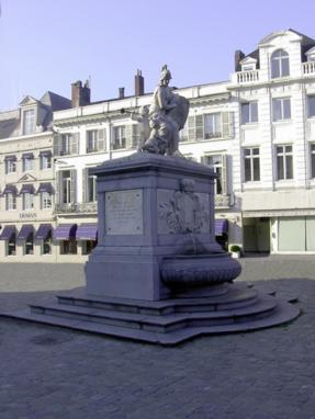 Titre : Photo de la fontaine du Grand Sablon à Bruxelles Licence : GFDL Source : Roby Roby